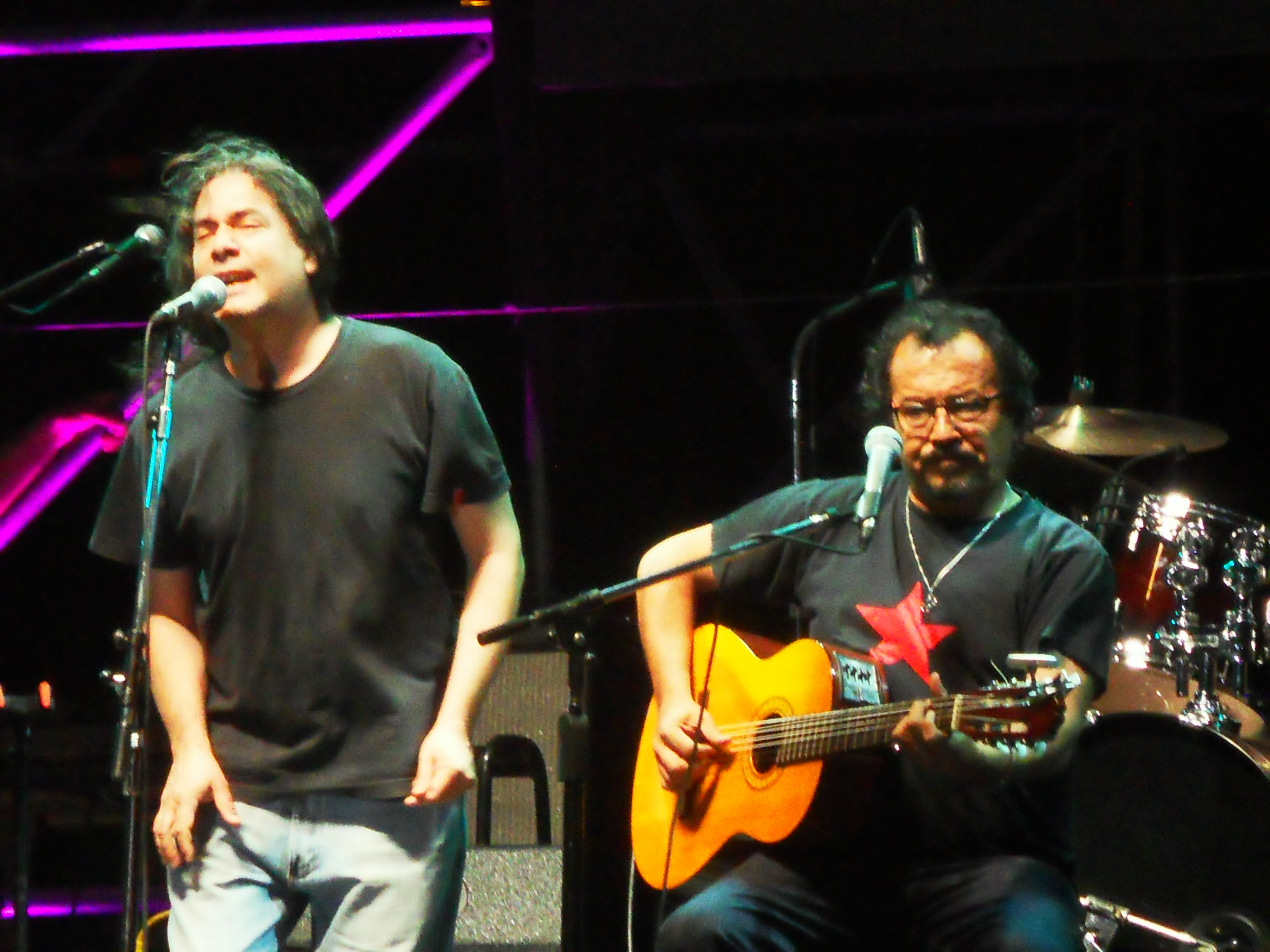 Orozco-barrintos en concierto